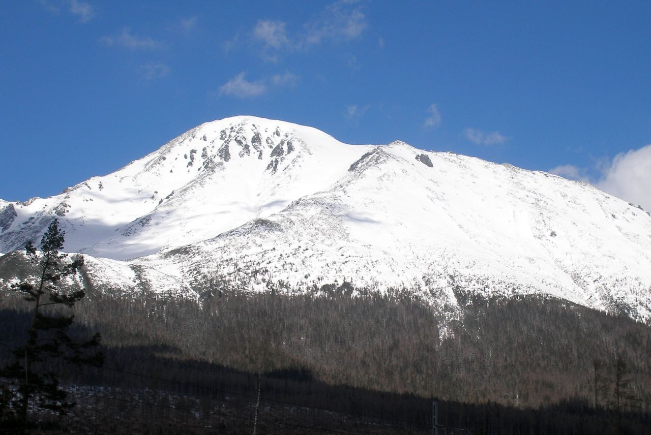 Pohľad z Tatranských Zrubov na masív Slavkovského štítu